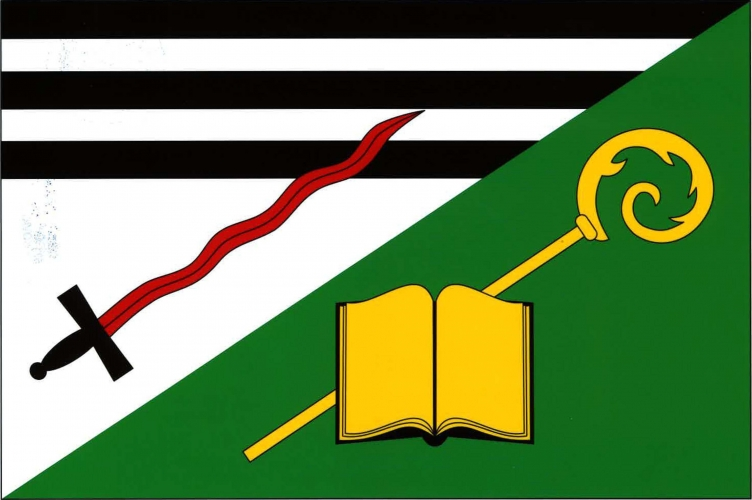 vlajka, Medlice, okres Znojmo